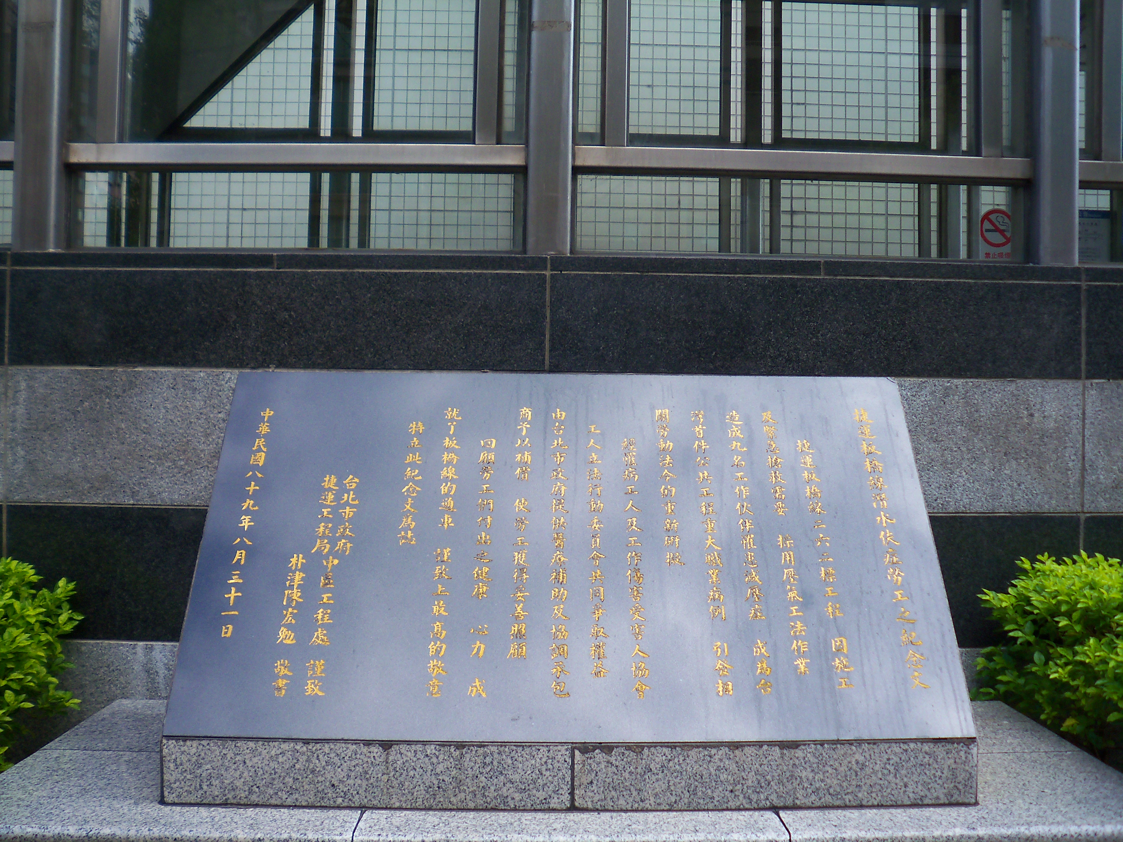 台北捷運板橋線江子翠駅3号出口側の板橋線減圧症労工紀念碑（2000年8月31日）。